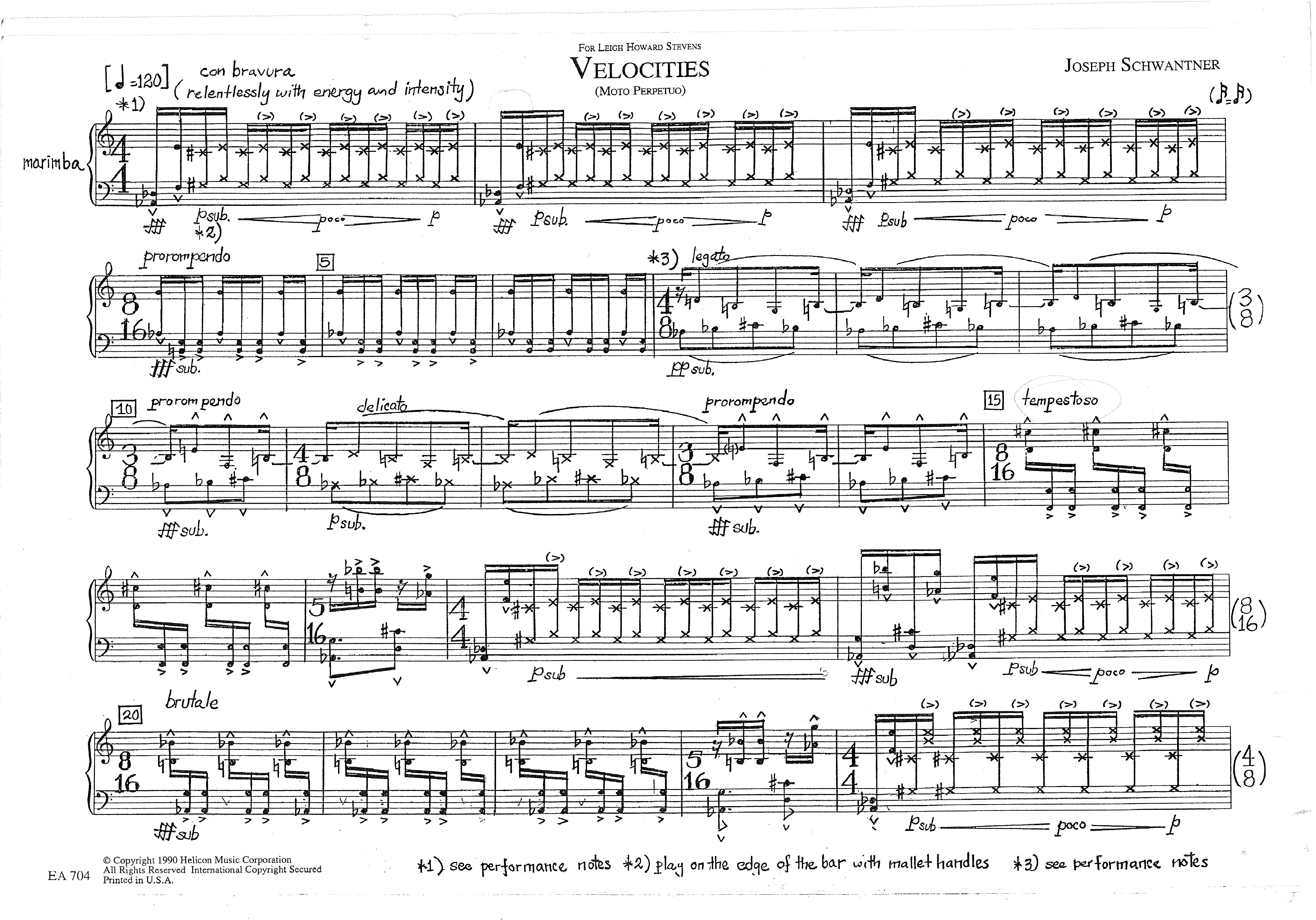 Primera pàgina (Introducció)